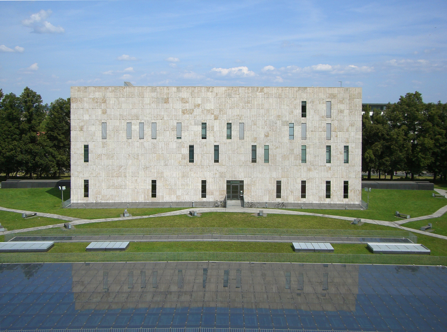 Zentralbibliothek am Zelleschen Weg 18 Foto: SLUB Dresden / Henrik Ahlers